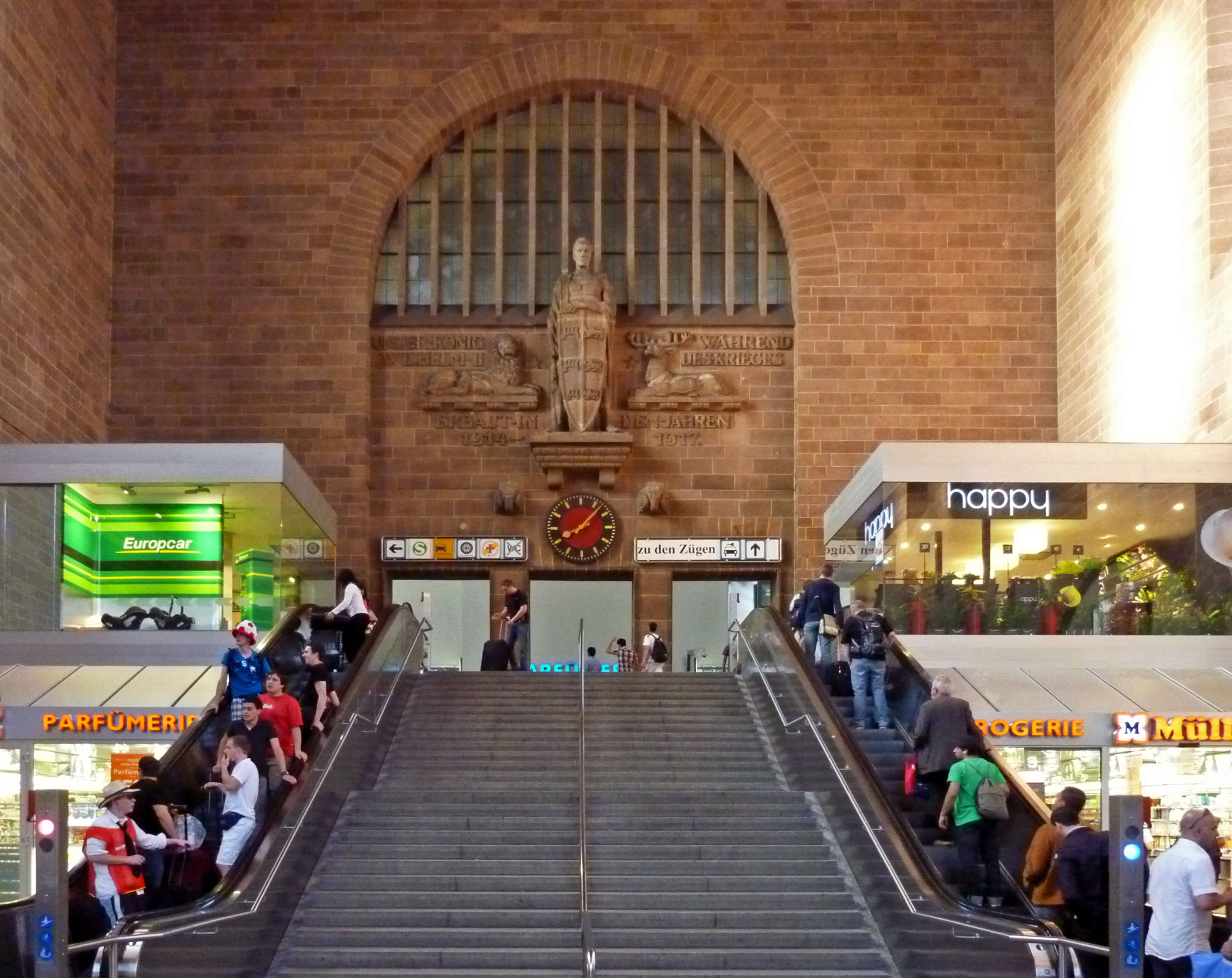 Stuttgart Hauptbahnhof, Große Schalterhalle